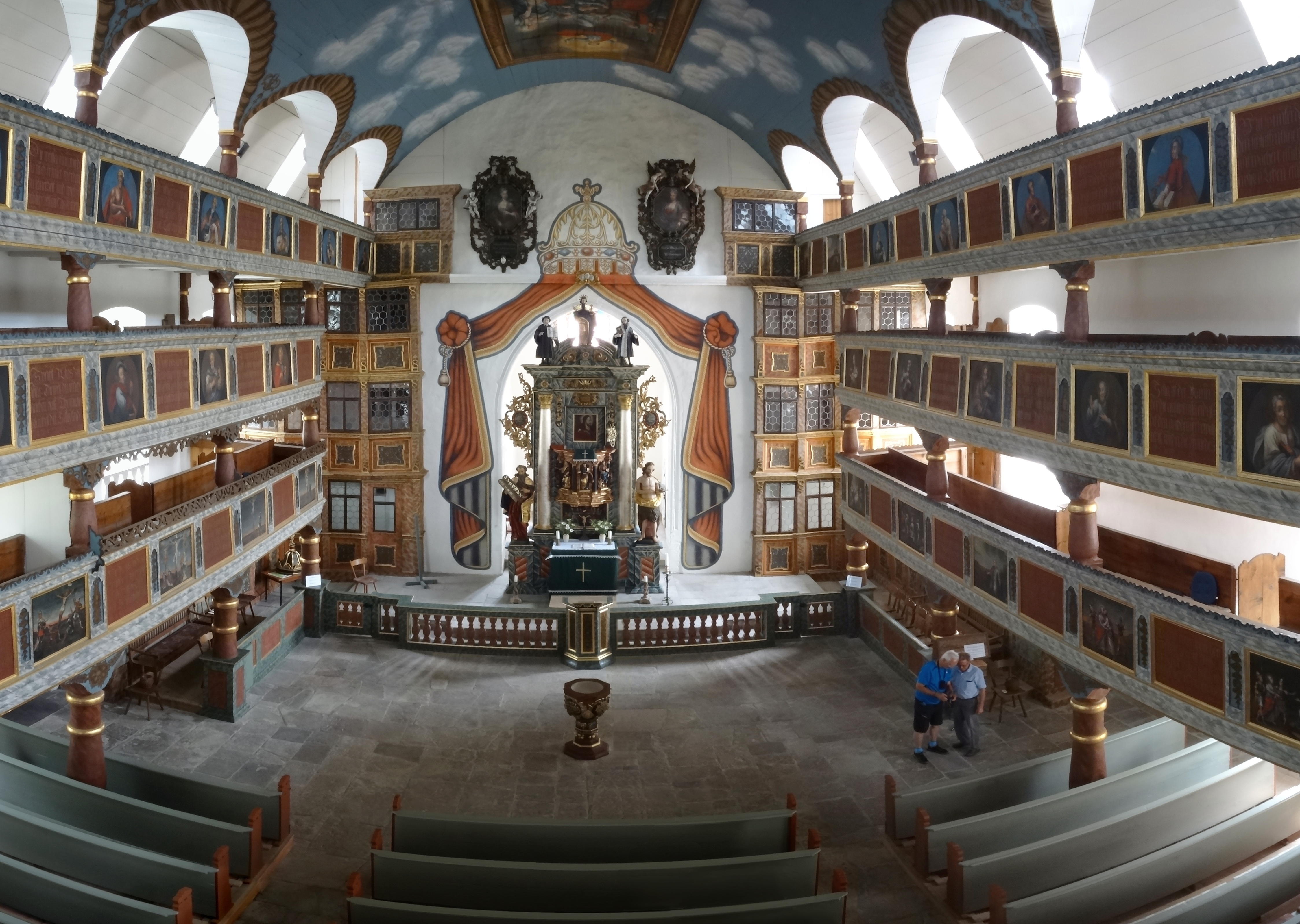 Panorama Dom der Rhön